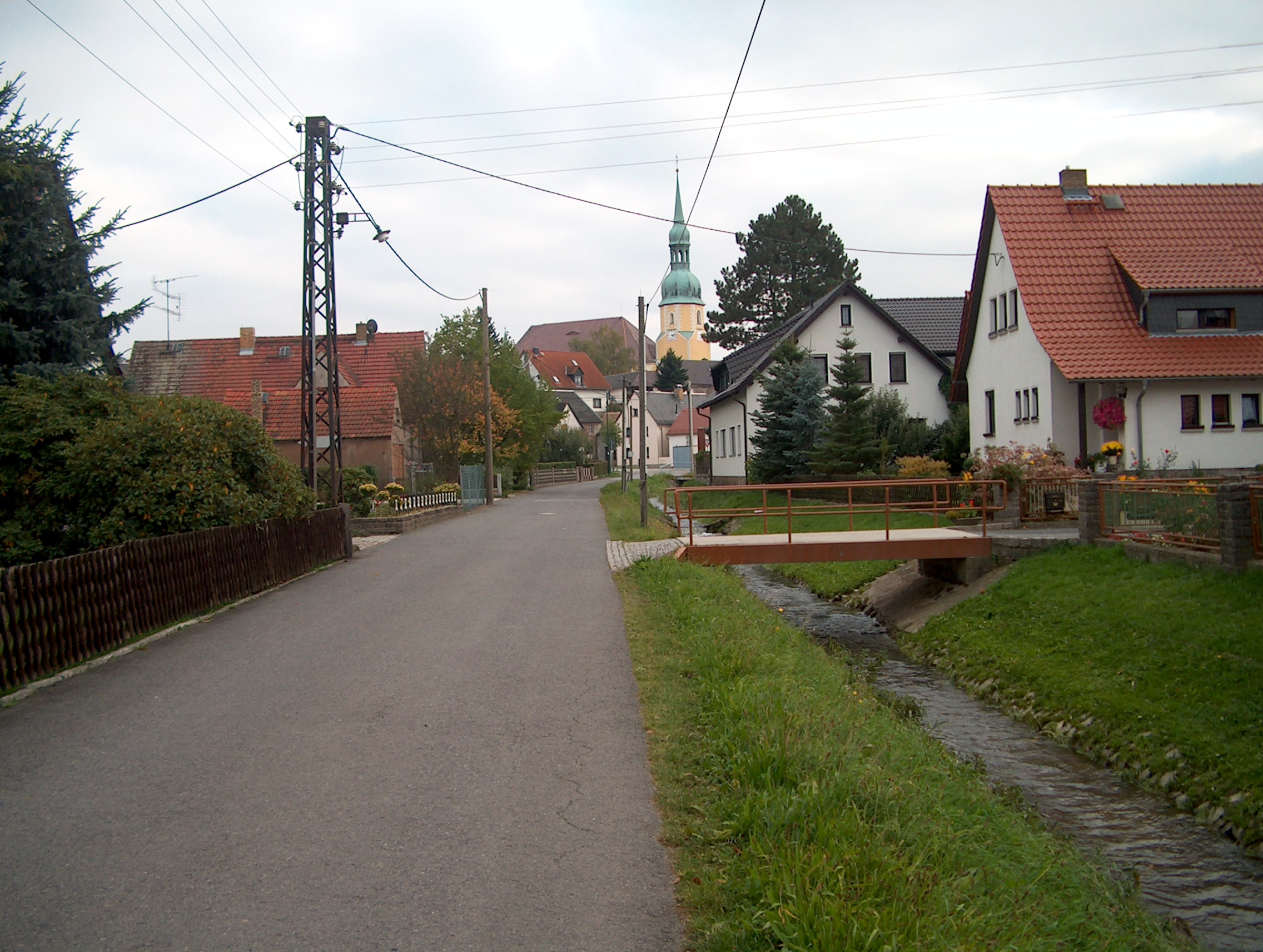 Satkula in Crostwitz Hornjoserbsce: Satkula w Chroscicach